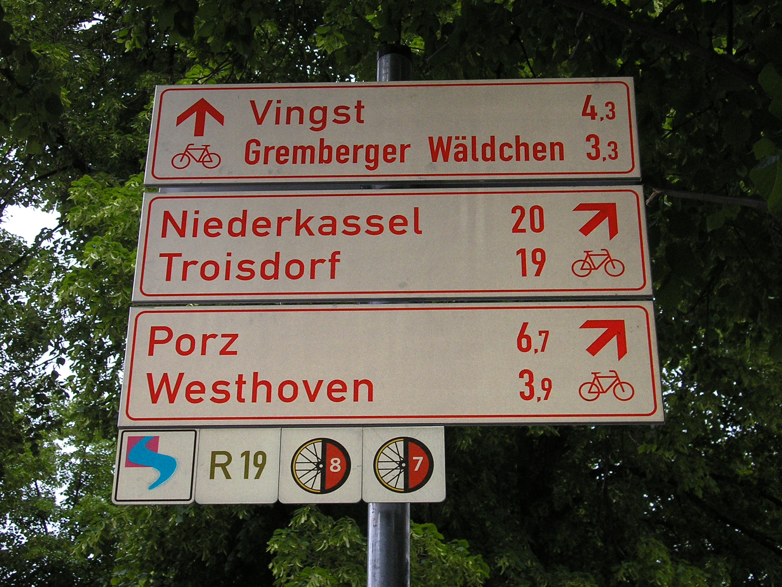 Radwegweiser am Rhein in Köln-Poll mit Kennzeichnung der D-Netz-Routen 7 und 8.